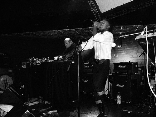 foto gemaakt door Andre Mesker